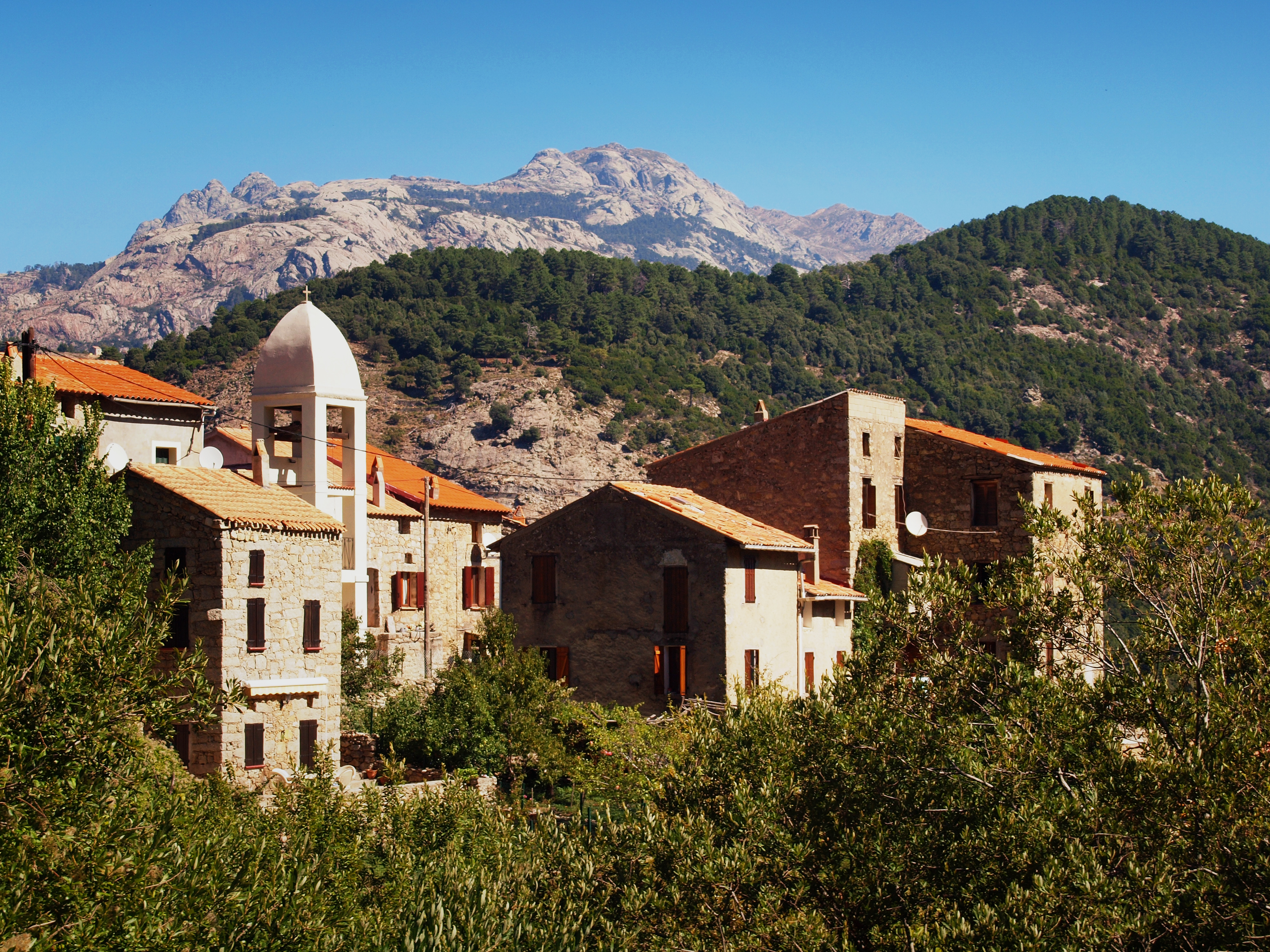 Marignana (Corsica) - Vue de Chidazzu